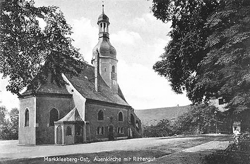 Die Auenkirche Markkleeberg um 1940 (mit Heizungsschornstein)